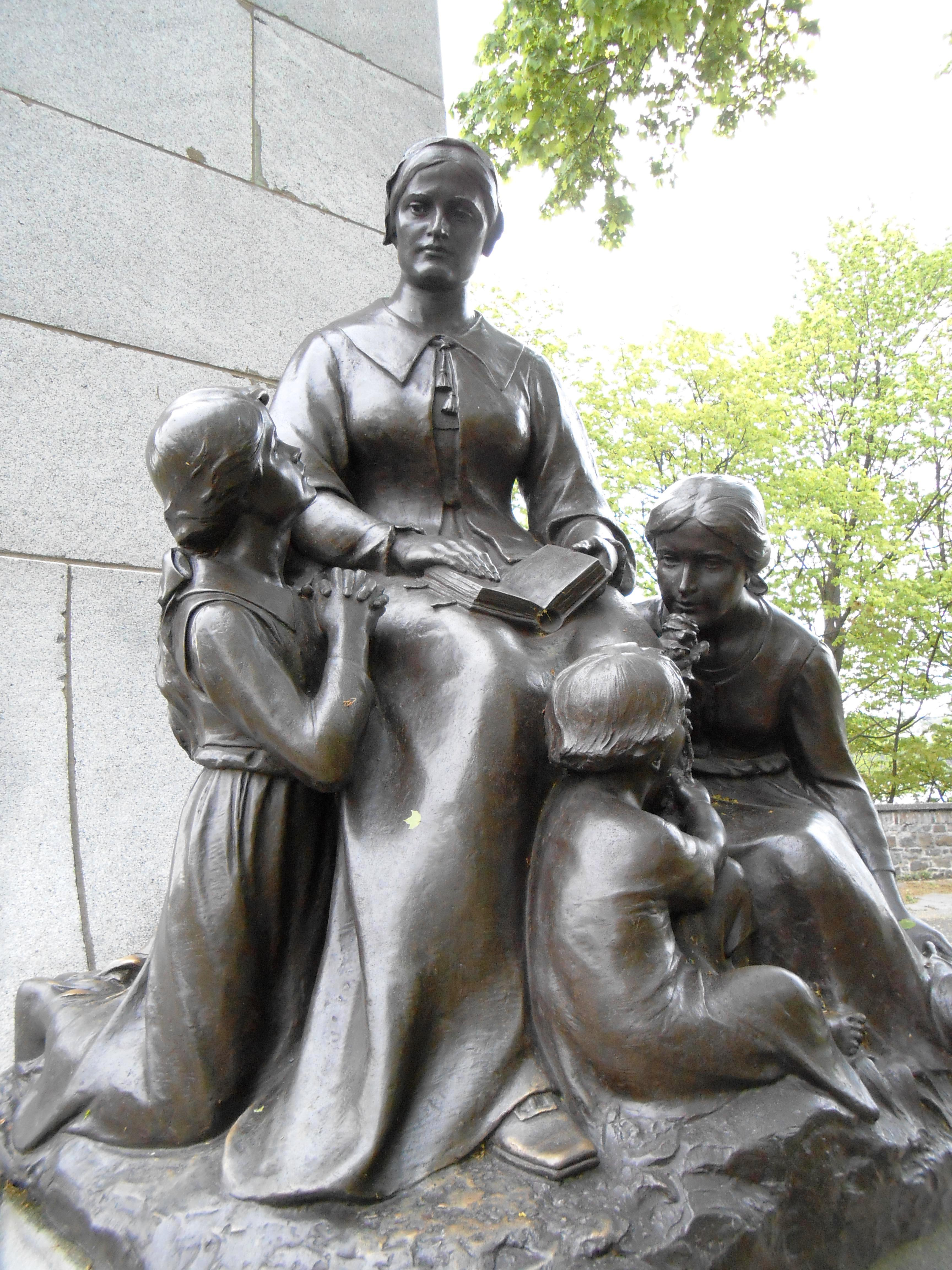 « Le monument Louis-Hébert (1575-1627) avait été initialement installé à la place de l'Hôtel de Ville, où il fut dévoilé le 3 septembre 1918, pour commémorer le troisième centenaire de l'arrivée en 1617 de cet apothicaire français qui est devenu le "premier colon canadien". Le monument fut démonté en 1971 et ultérieurement déménagé dans le parc Montmorency, au sommet de la côte de la Montagne. Les terres de Louis Hébert s'étendaient sur le site actuel de la Basilique Notre-Dame de Québec, du Séminaire, de l'Hôtel-Dieu, et des rues Hébert et Couillard. La statue en bronze de Louis Hébert au sommet du monument, et les personnages des hauts-reliefs en bronze reposant les socles, sont l'œuvre du sculpteur montréalais Alfred Laliberté. L'artiste a représenté Louis Hébert élevant une poignée d'épis de blé vers le ciel, offrant au Seigneur sa première récolte. Les personnages des hauts-reliefs sont : à droite, Marie Rollet, épouse Louis Hébert qui, assise au milieu de ses trois enfants, tient un livre et les instruit; à gauche, une statue du défricheur Guillaume Couillard, son gendre, appuyé sur une charrue. Le piédestal est orné de festons, d'écussons, et d'inscriptions incluant les noms des quarante-sept premiers colons de Québec. »